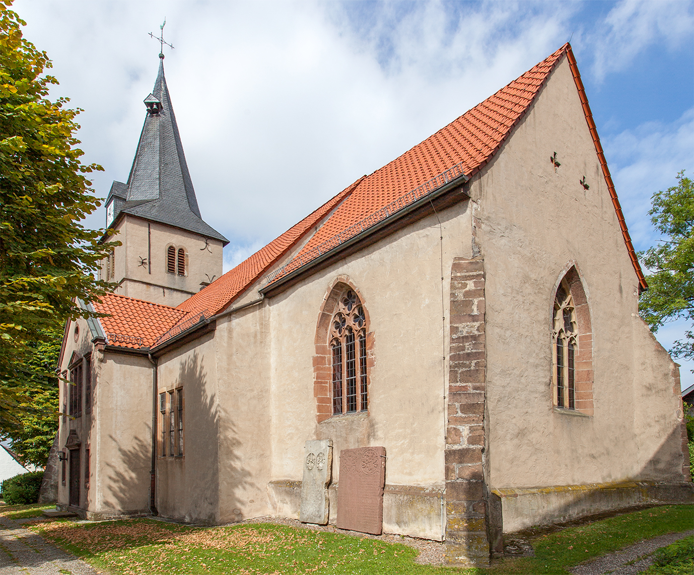 Evangelische Kirche Barntrup, Kreis LippeThis is a photograph of an architectural monument.